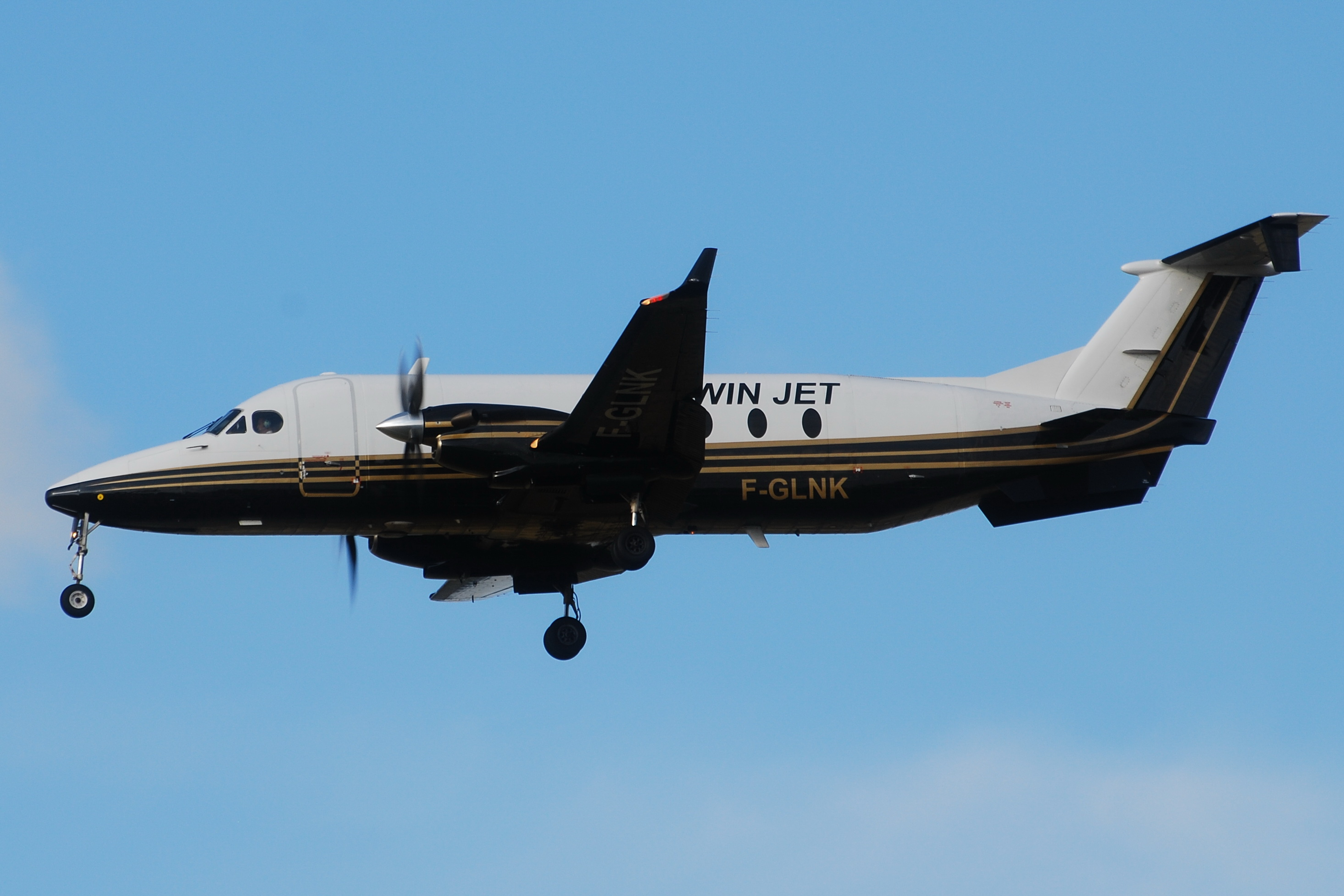 Photo prise à l'aéroport de Toulouse-Blagnac (LFBO) en France. Picture take at Toulouse-Blagnac Airport (LFBO) in France.